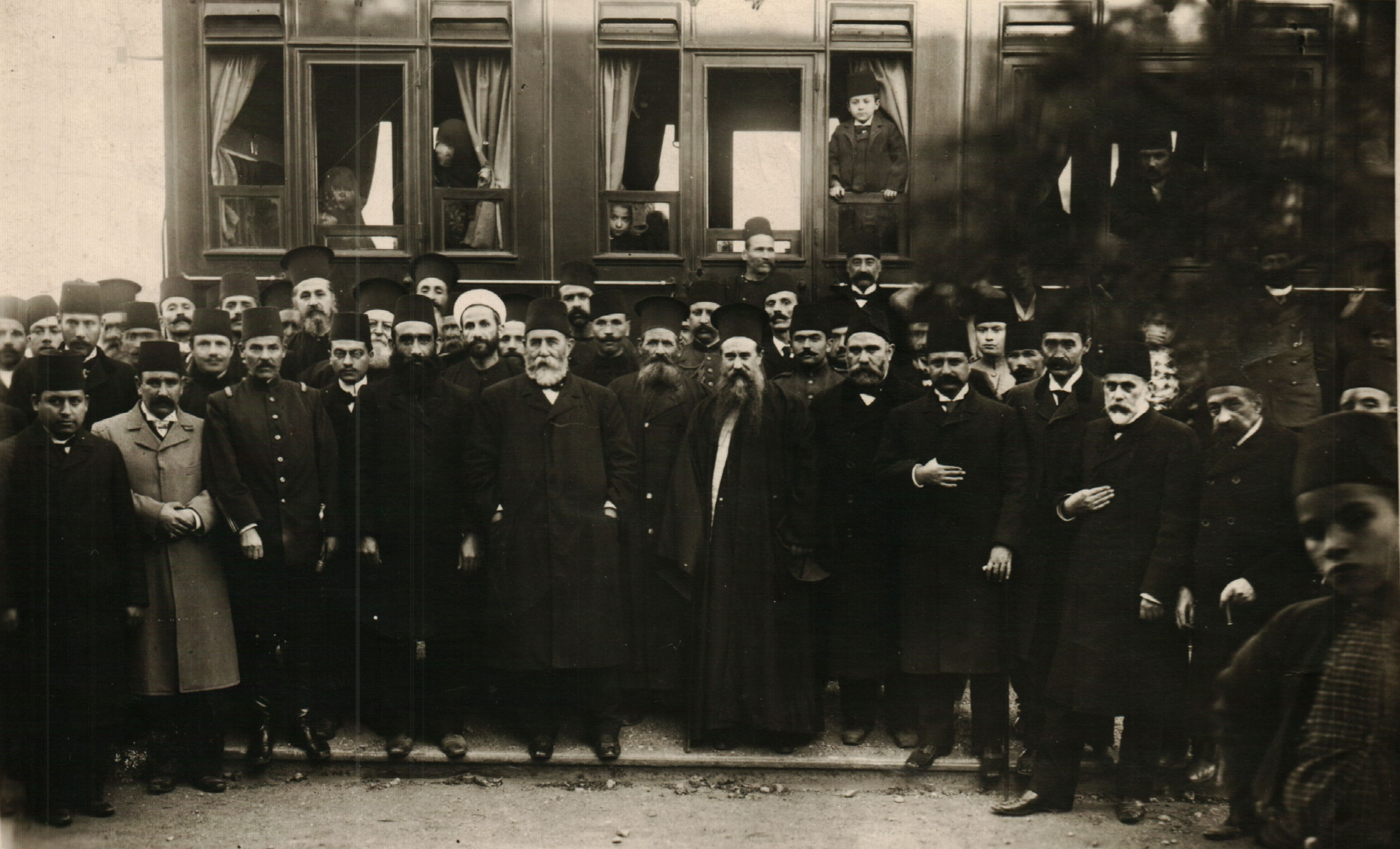 Снимка от посрещането на Хилми паша на гара Кукуш.